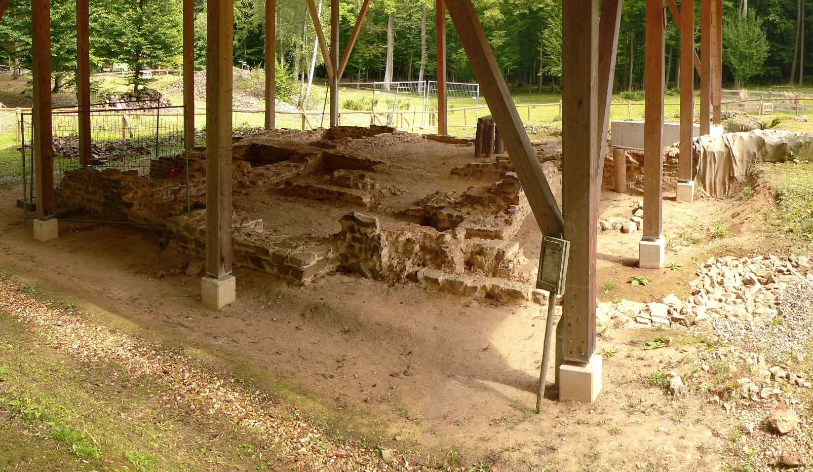 Freigelegtes Herrenhaus unter Schutzdach der Villa Rustica Weiler